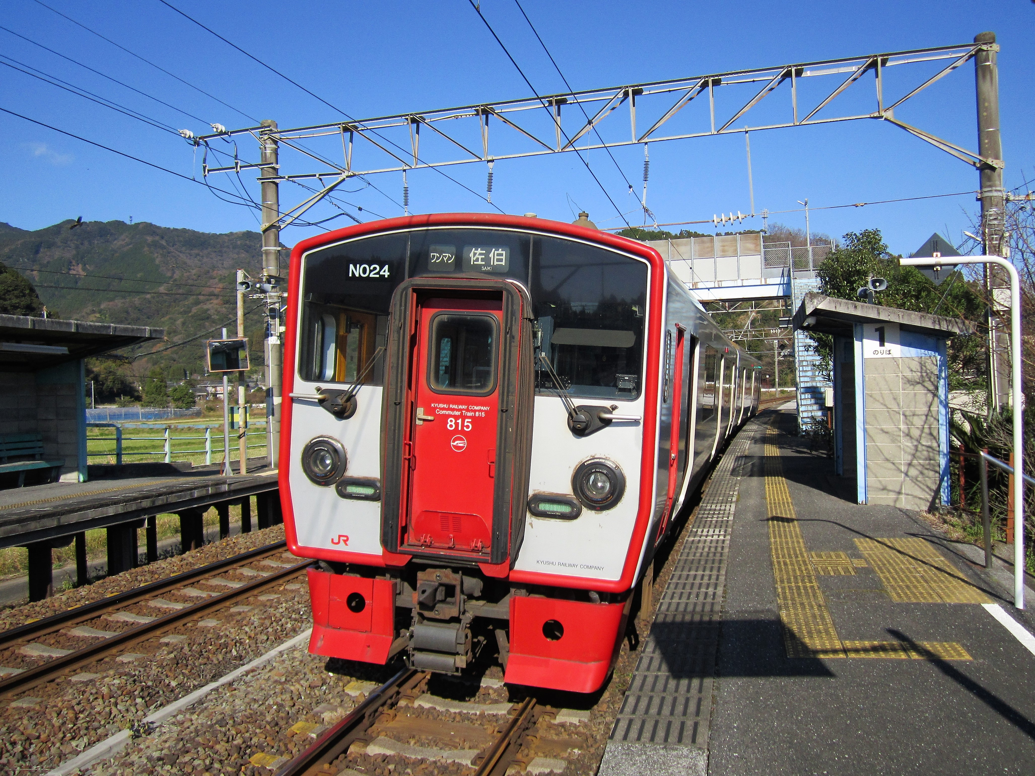 日豊本線 狩生駅1番線に停車中の815系電車 Canon PowerShot A2200